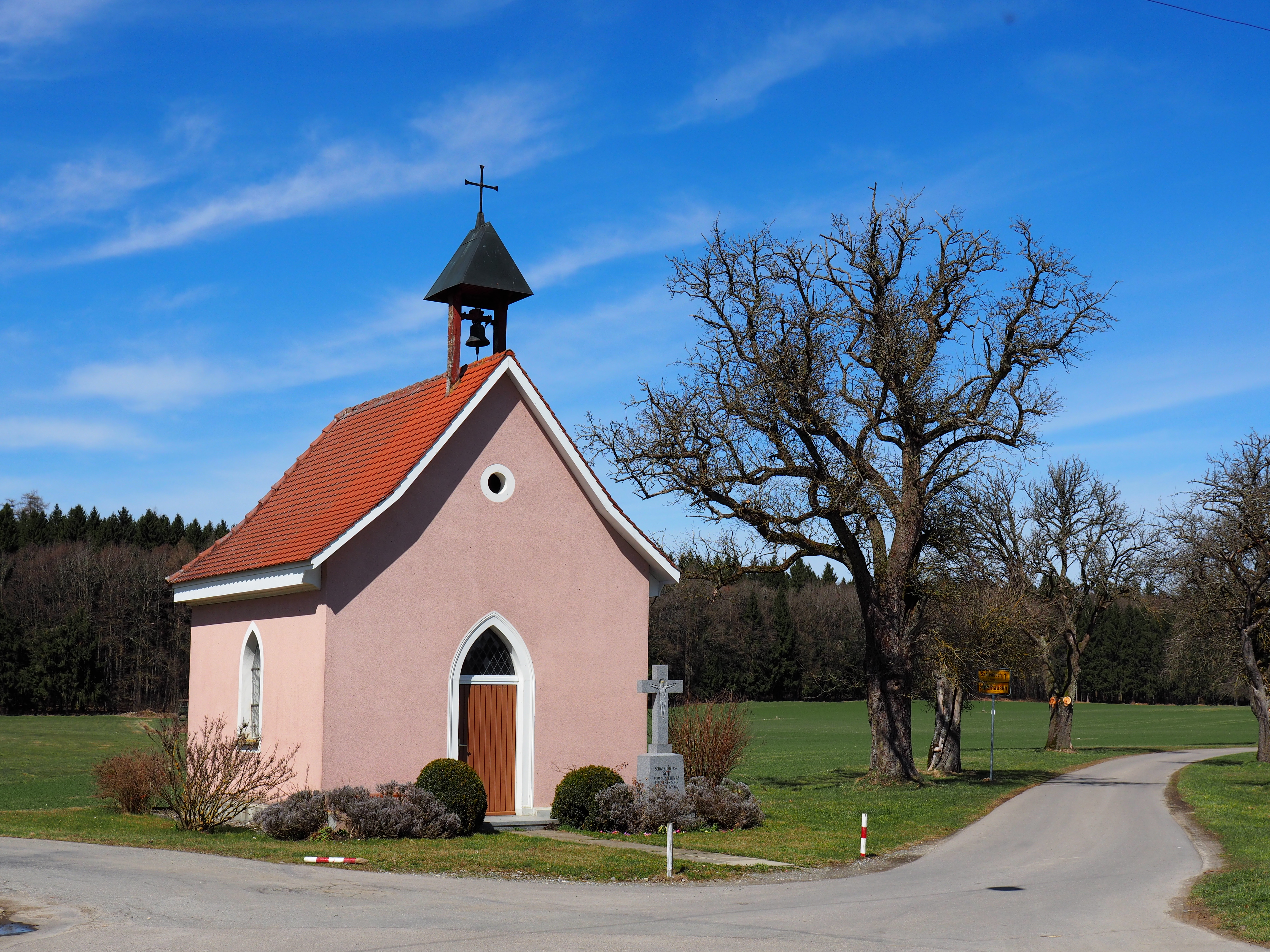 Kapelle St. Sebastian in Herdwangen-Schönach, OT Mühlhausen